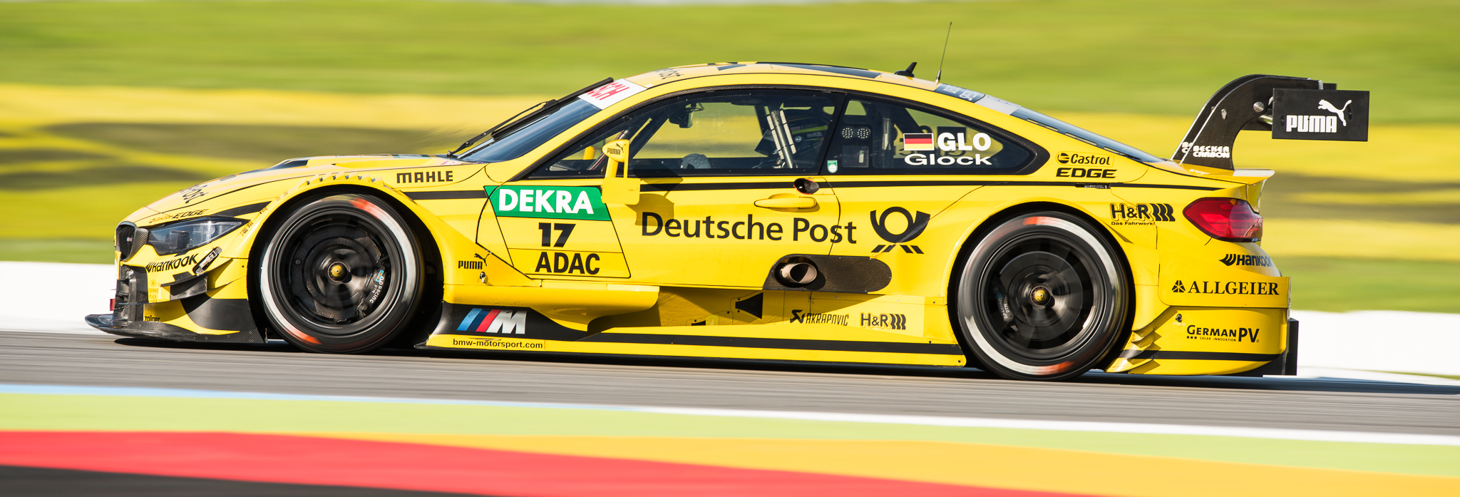 DTM,Deutsche Post BMW M4 DTM,Deutsche Tourenwagen Masters,Hockenheimring,MTEK GmbH,Motorsport,Timo Glock